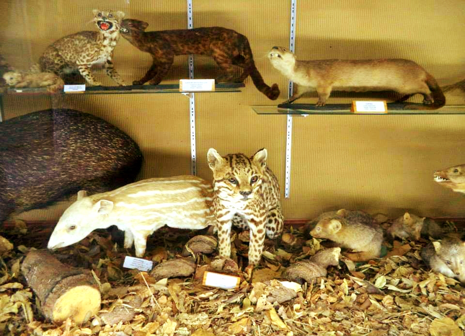 Centro de Interpretação da Natureza Frans Krajcberg, no Parque Ecológico Samuel Klabin, em Telêmaco Borba, no Paraná.